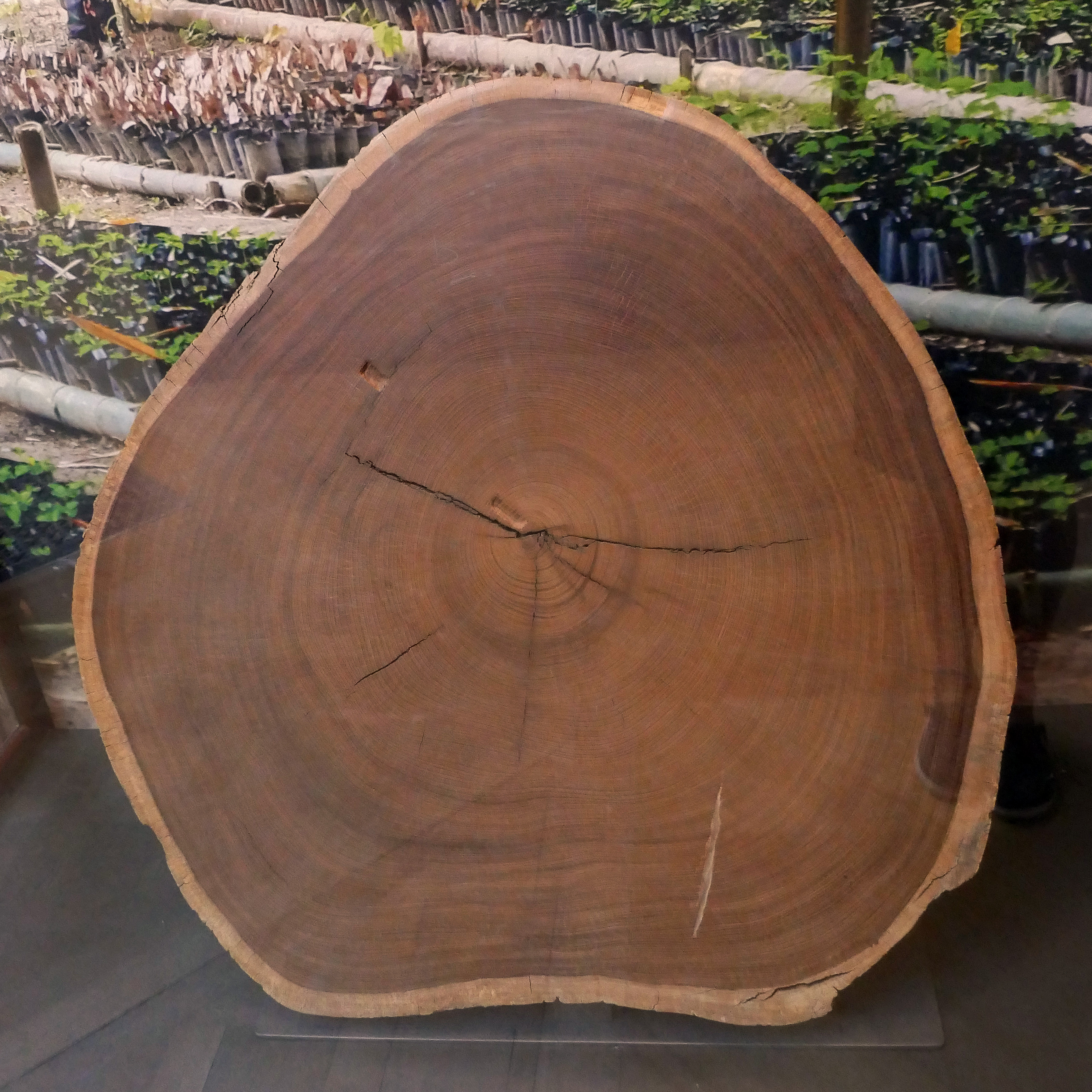 Section de tronc de Pericopsis elata à l'Africa Museum de Tervuren (Belgique). En provenance de Yangambi (RDC).